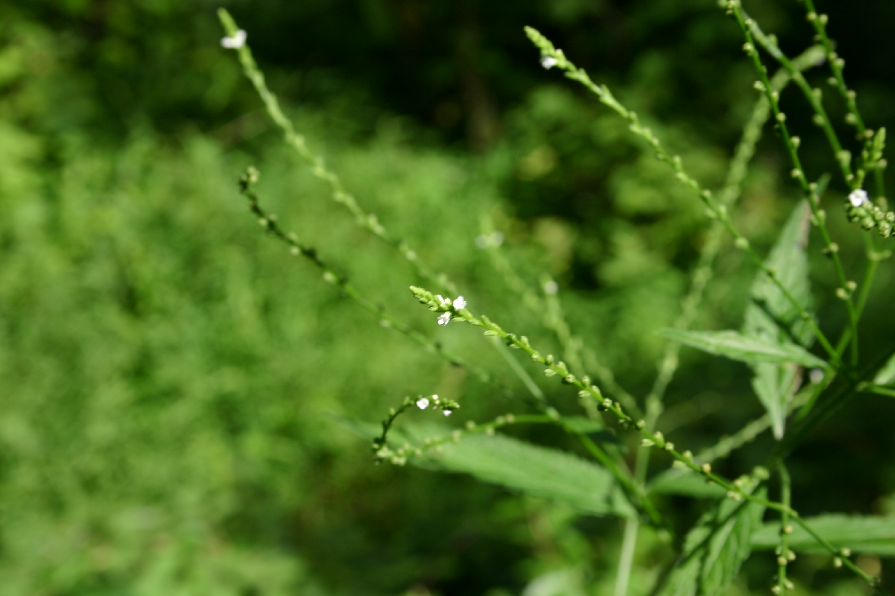 Verbena urticifolia